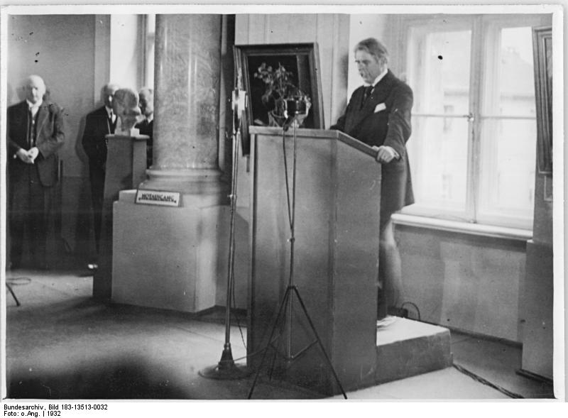 Berlin, Große Kunstausstellung, Eröffnung Eröffnung der Großen Berliner Kunstausstellung im Schloss Bellevue. Hans Baluschek bei der Eröffnungsrede 13513-32 Abgebildete Personen: Baluschek, Hans Prof.: Maler, Grafiker, Deutschland